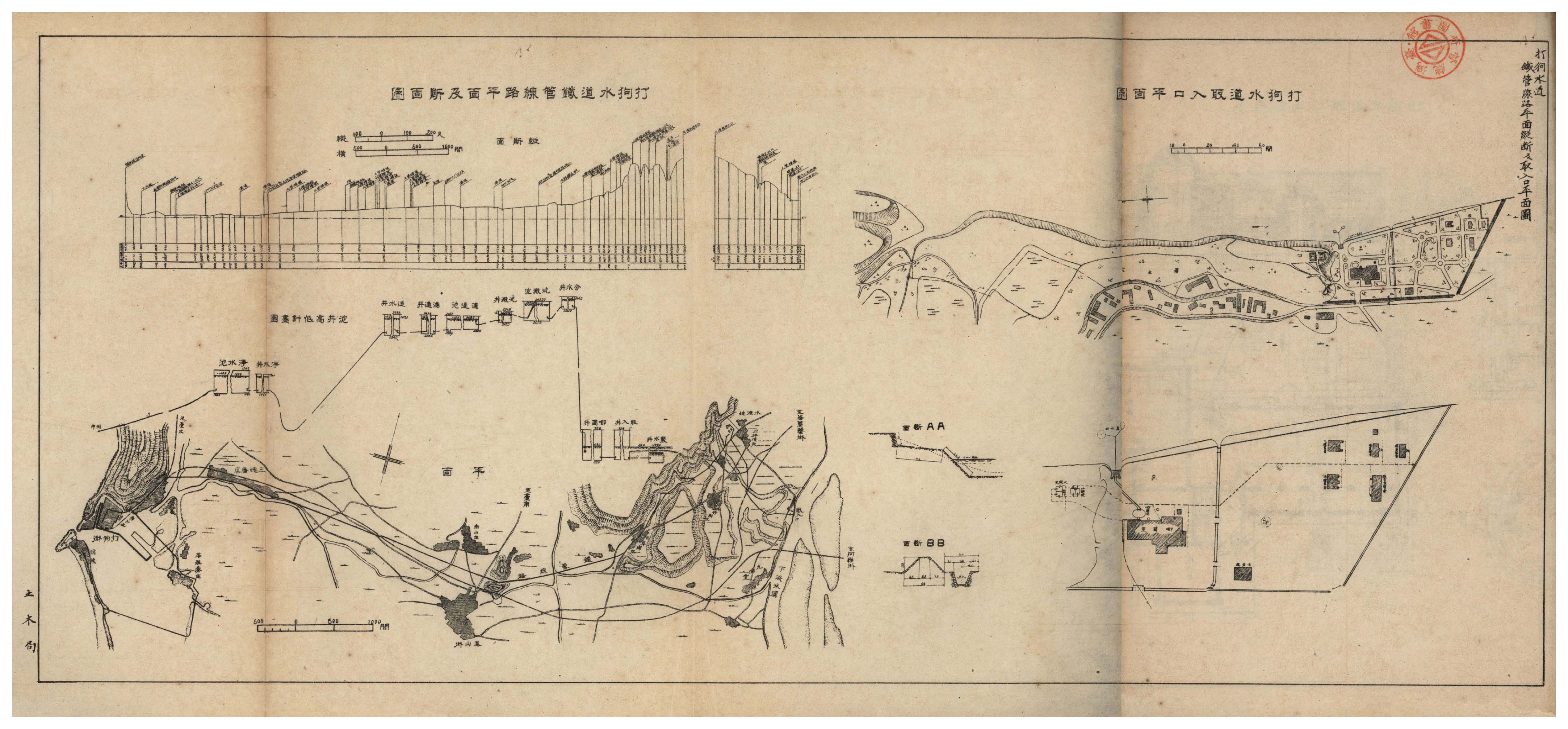 高雄水道位於高雄市鼓山。